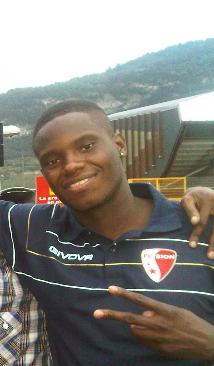 Guilherme Afonso devant le stade de Tourbillion